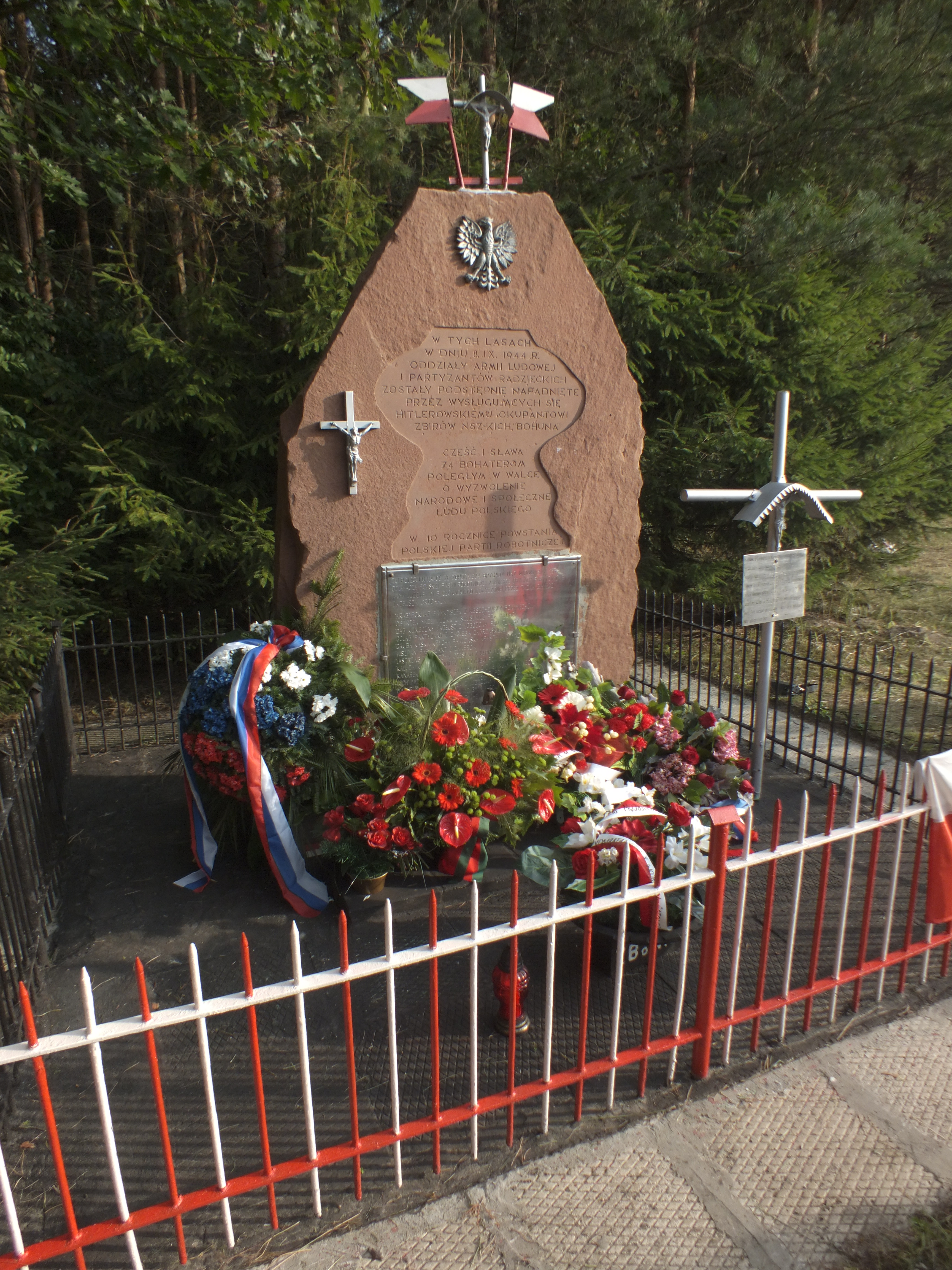 Dawny pomnik ku czci żołnierzy Armii Ludowej i partyzantów radzieckich, którzy zginęli 8 wrzesnia 1944 w Rząbcu. Rozebrany w 2018 r.